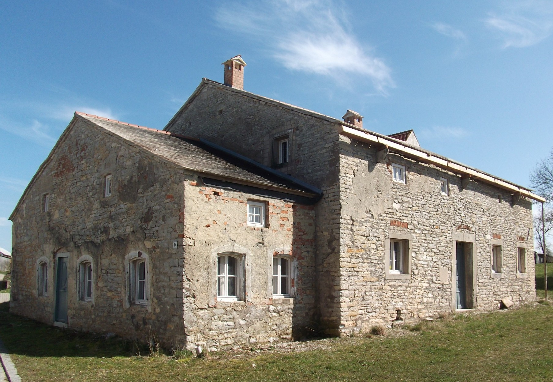 Eingeschossiges giebelständiges Gebäude mit Flachsatteldach in Jura-Bauweise, mit hohem Kniestock, teilweise Fachwerk, 1727 datiert, mit eingeschossigem Vorbau (ehemaliges Austragshaus), 1810